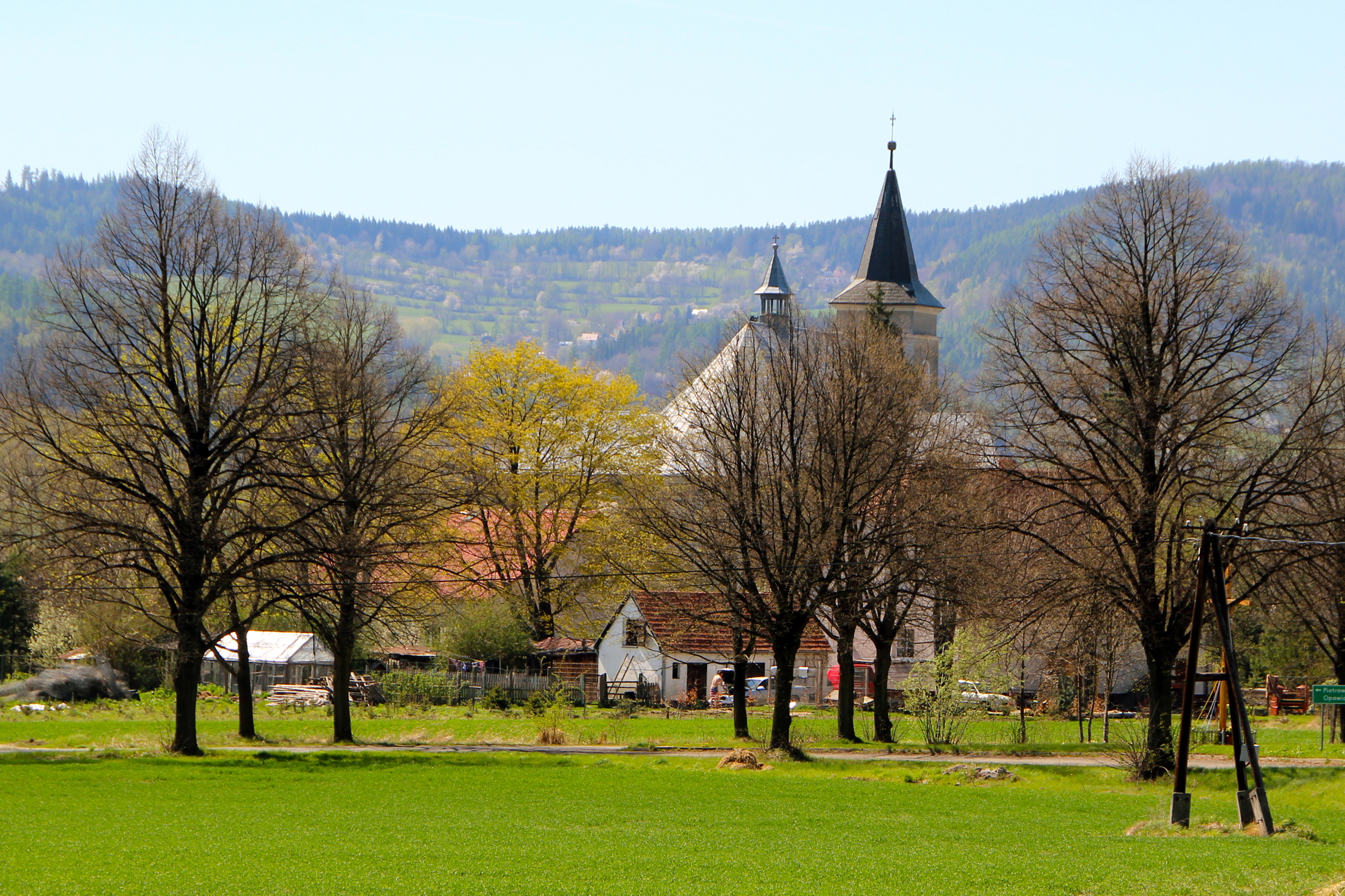 Opawica - kościół parafialny p.w. Świętej Trójcy, 1701-1796, 1829 (zabytek nr 120/54 z 25.08.1954)